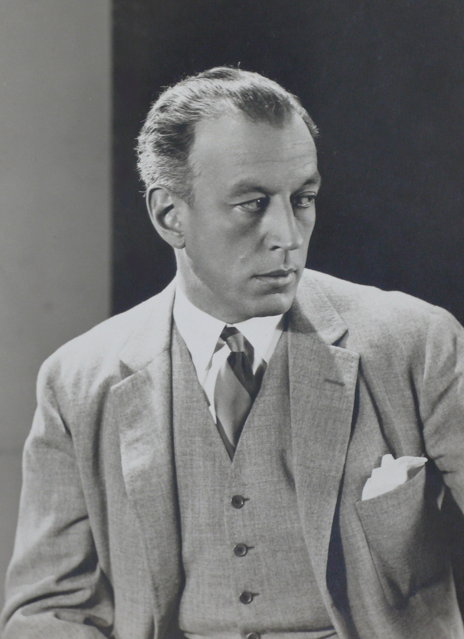 Anonyme «Bernard Boutet de Monvel» 1926